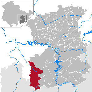 Wurzbach in Thuringia - Saale-Orla-Kreis